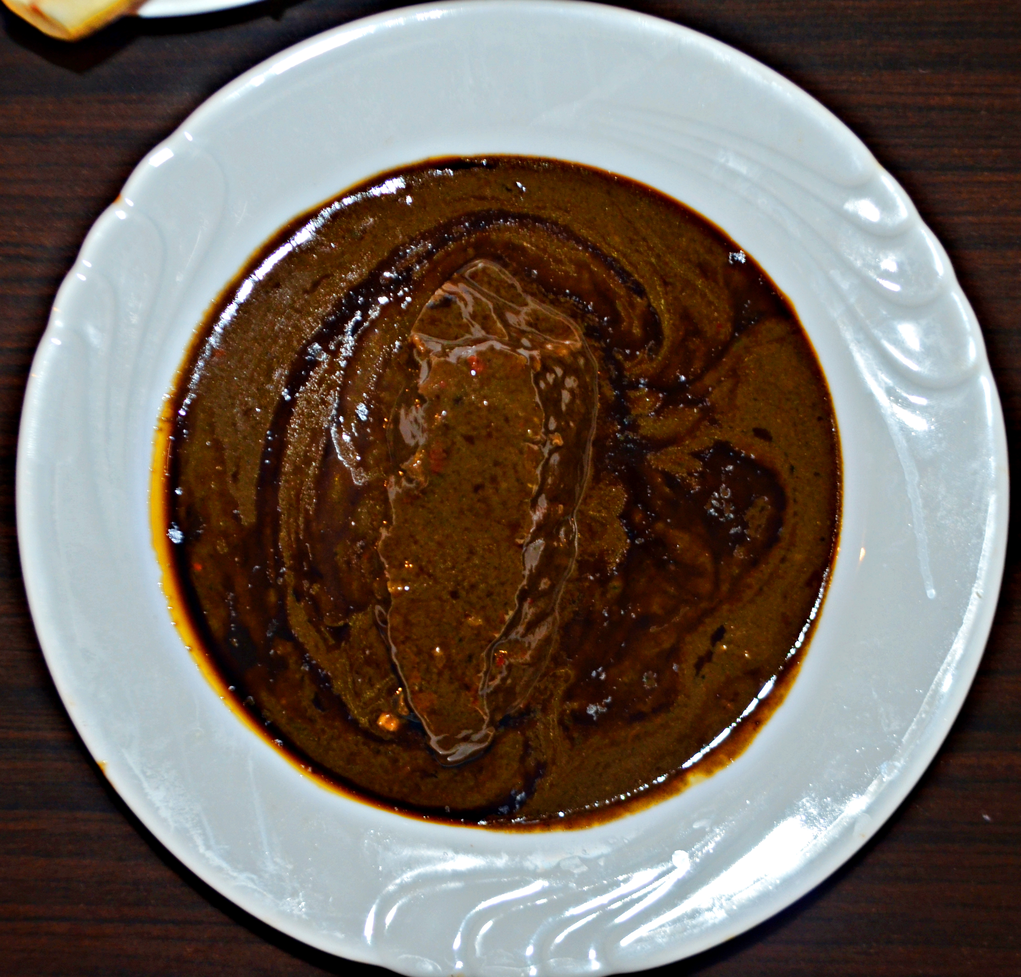 ملوخية تونسية باللحم